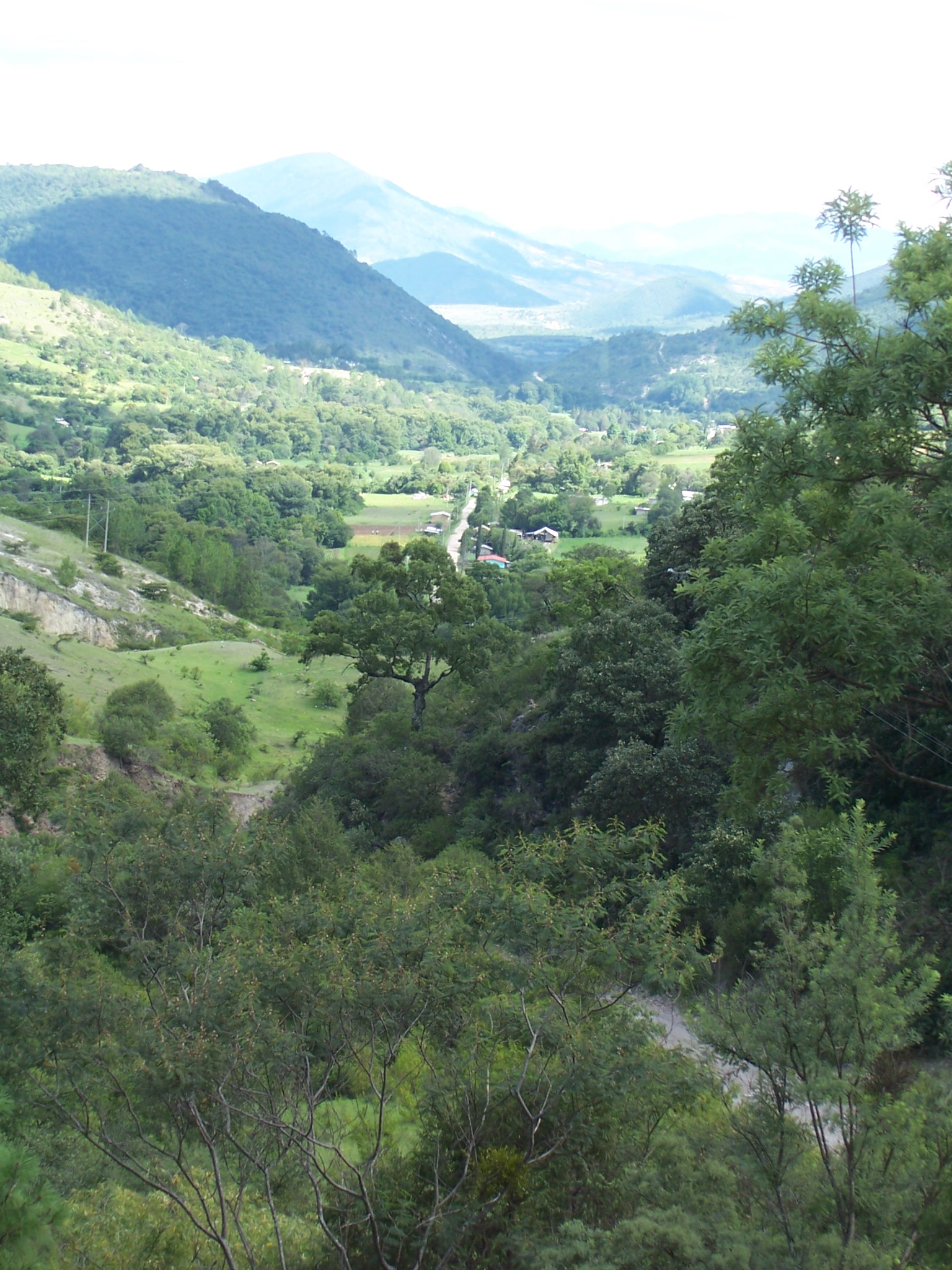 Camino Ixtapa - Tlacotepec a su llegada a San Juan Achiutla, estado de Oaxaca, Mëxico